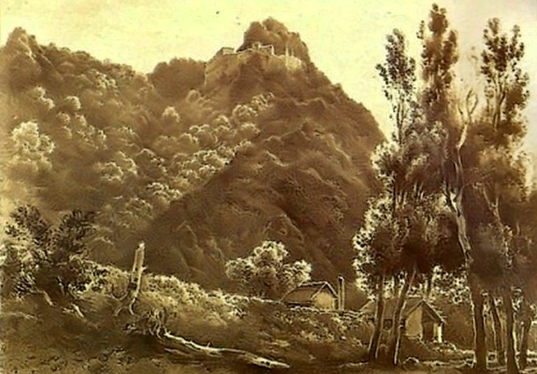 Valmozzola